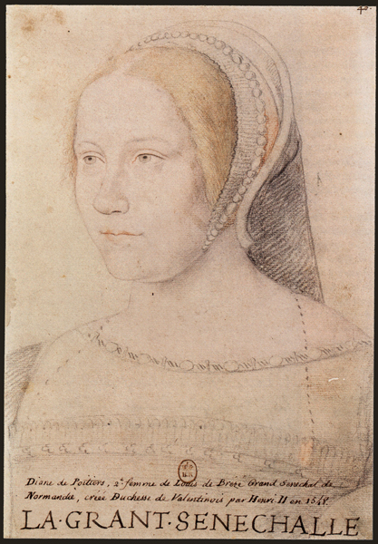 Diane de Poitiers, duchesse de Valentinois, maîtresse du roi de France Henri II. D'après un original antérieur à 1525. Pierre noire et sanguine. 258 x 178 mm. Inscriptions à l'encre brune, au bas : « Diane de Poitiers, 2e femme de Louis de Brézé Grand Senechal de / Normandie, créée Duchesse de Valentinois par Henri II en 1548 / LA.GRANT.SENECHALE ». L'inscription en capitales est du XVIe siècle, celle en italique est postérieure. Paris, BNF, Estampes, Rés. Na 22